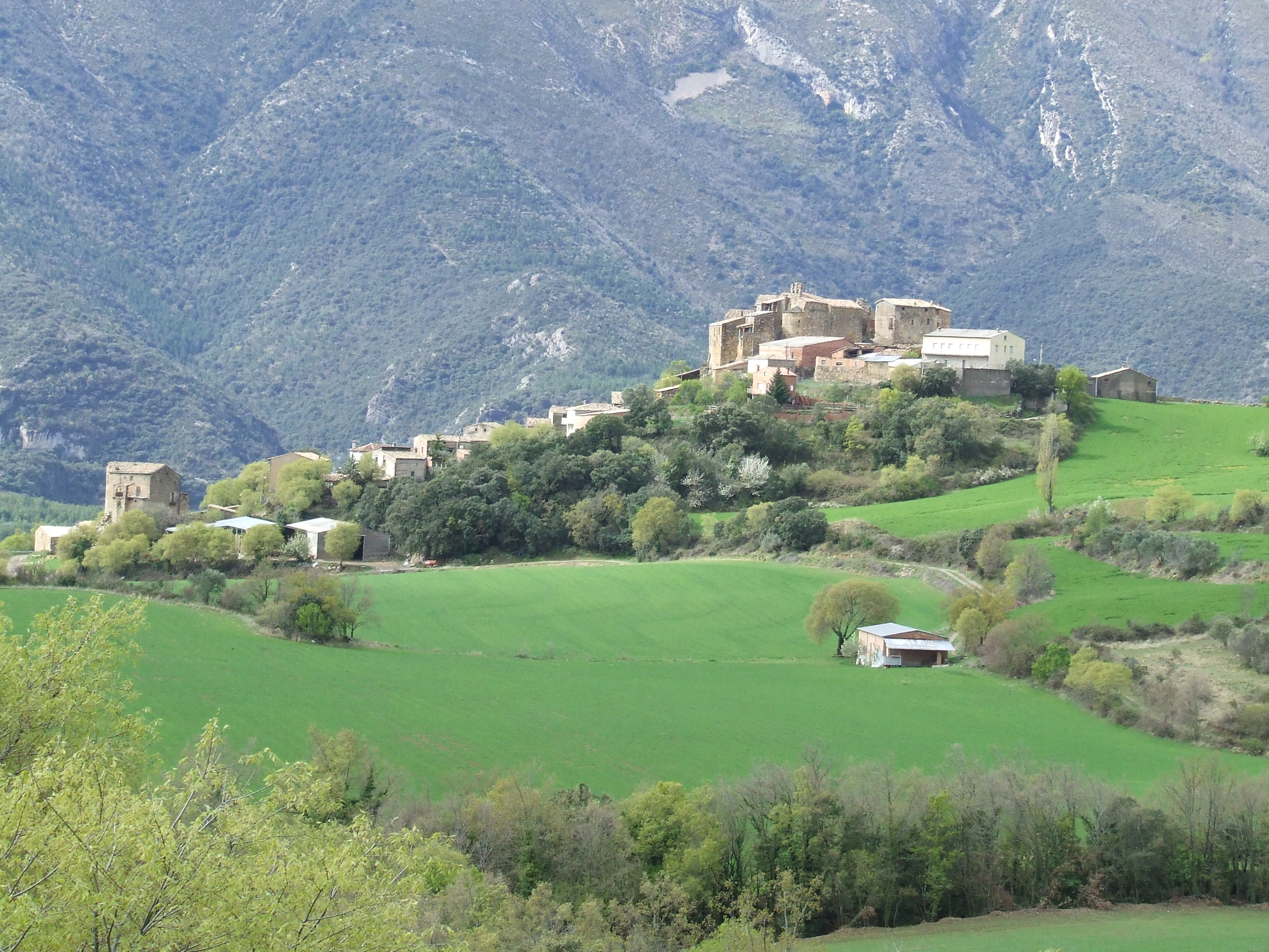 El poble de Moror des d'Estorm, al nord (Sant Esteve de la Sarga, Pallars Jussà)